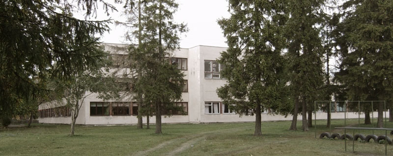 Новый корпус русской школы в городе Тапа (пристройка к ранее построенному)